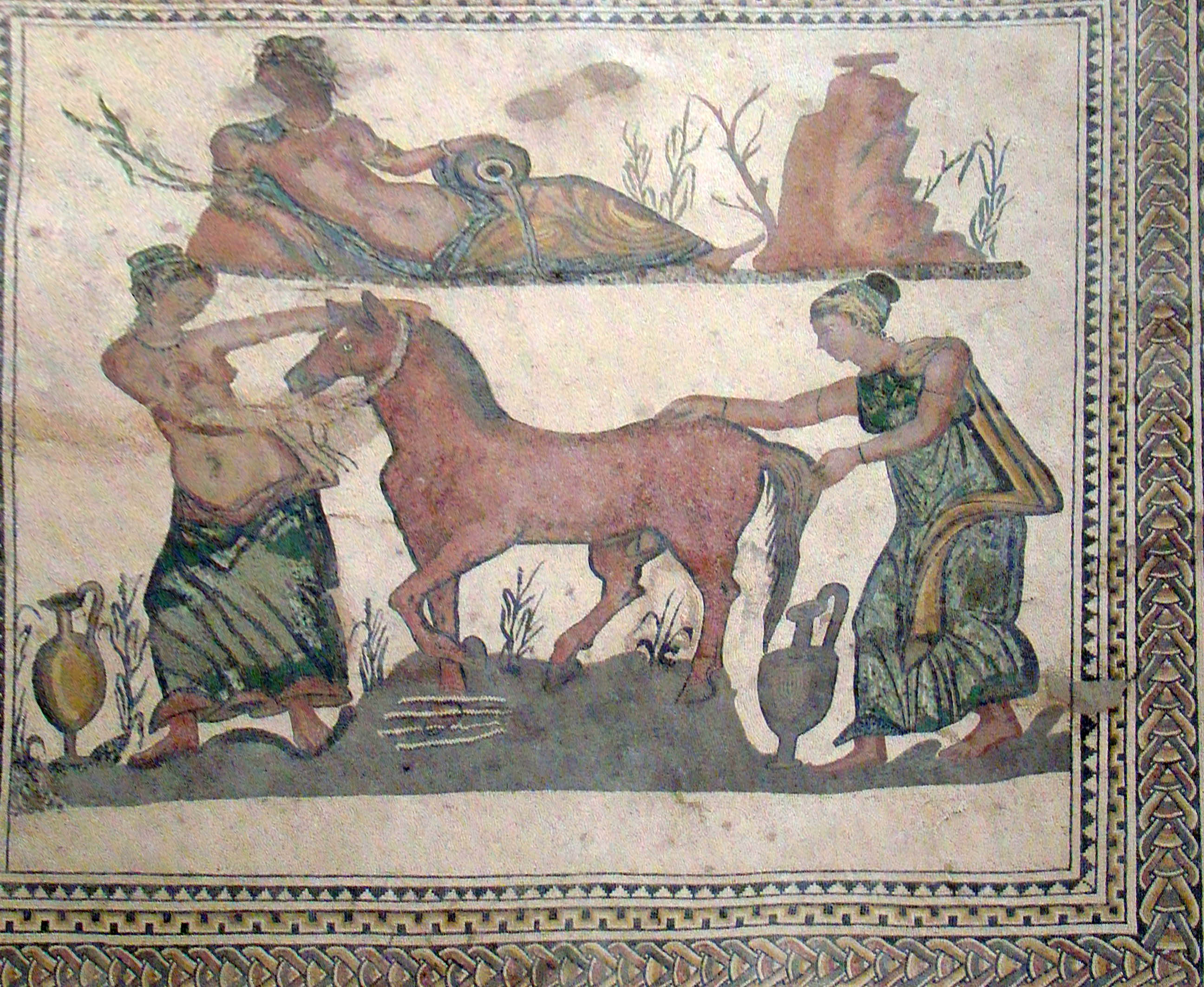 Villa romana de Almenara de Adaja, provincia de Valladolid (España). Detalle del mosaico de Pegaso en el salón familiar.